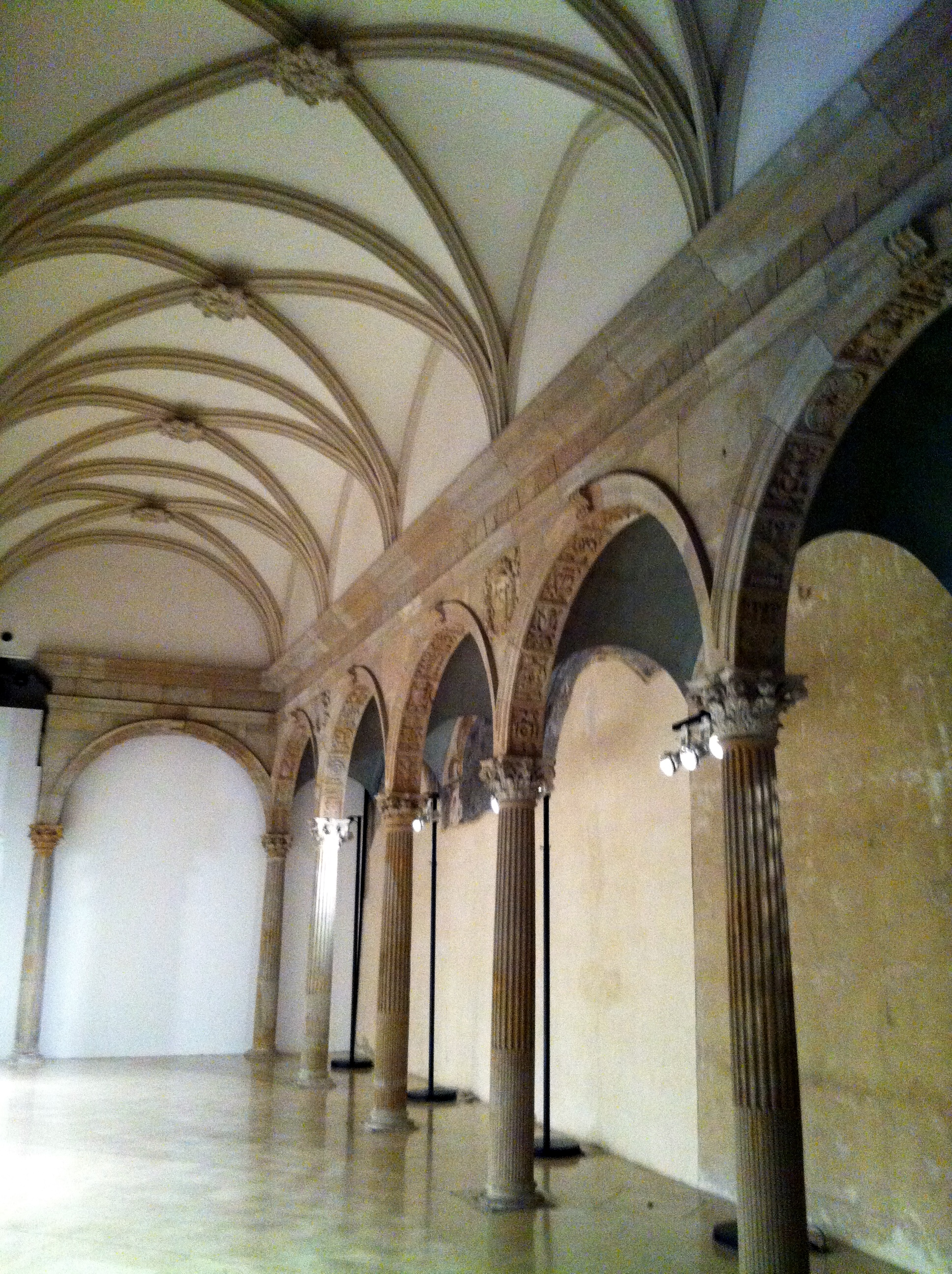 Museu d'Art Contemporani de Barcelona, MACBA